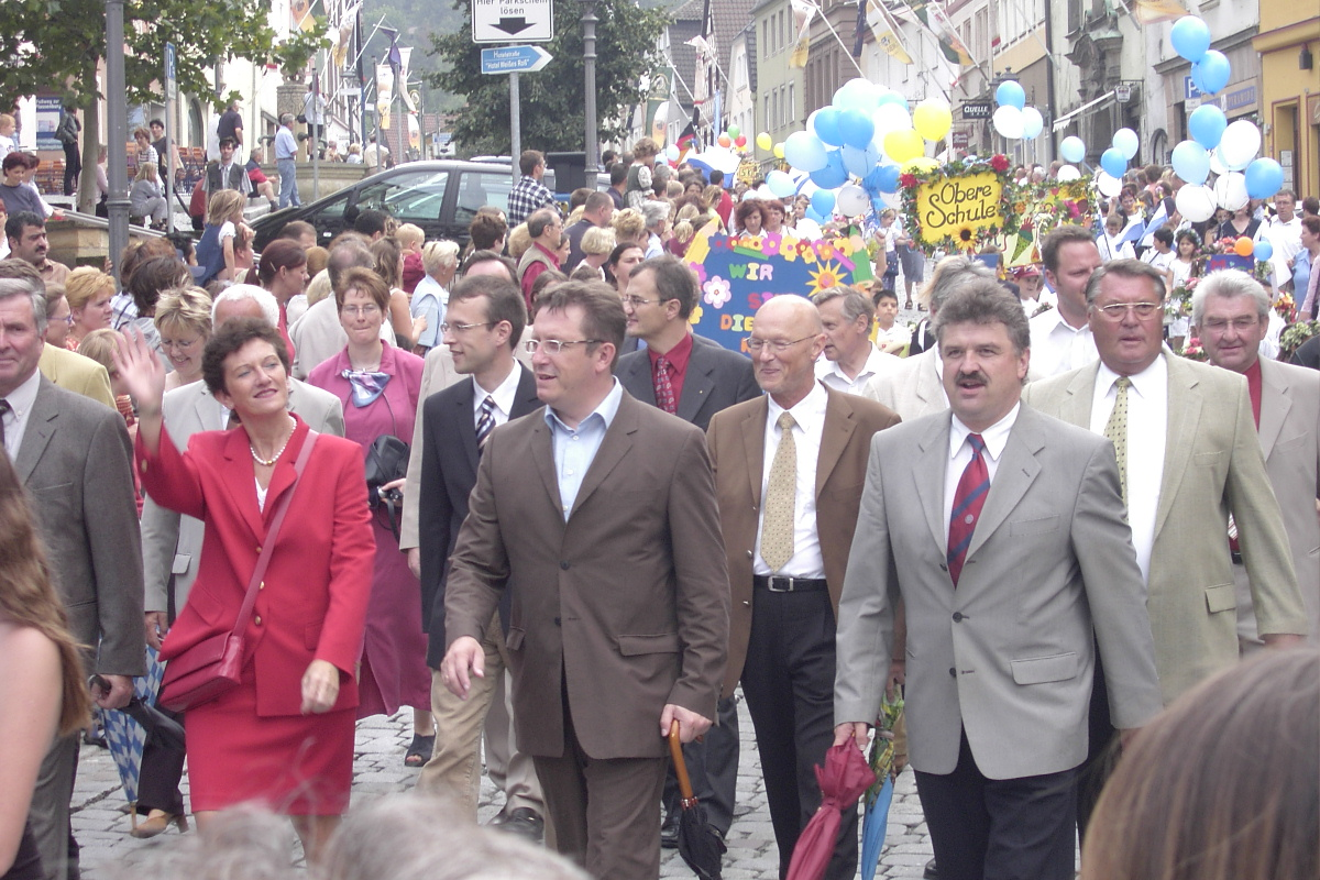 Am Gregori-Tag im Juli 2004 ziehen die Schüler aller Kulmbacher Volksschulen zum Rathausplatz, Bild zeigt den Zug in der Oberen Stadt. Von links MdL Inge Aures, Oberbürgermeister Henry Schramm und Landrat Klaus Peter Söllner